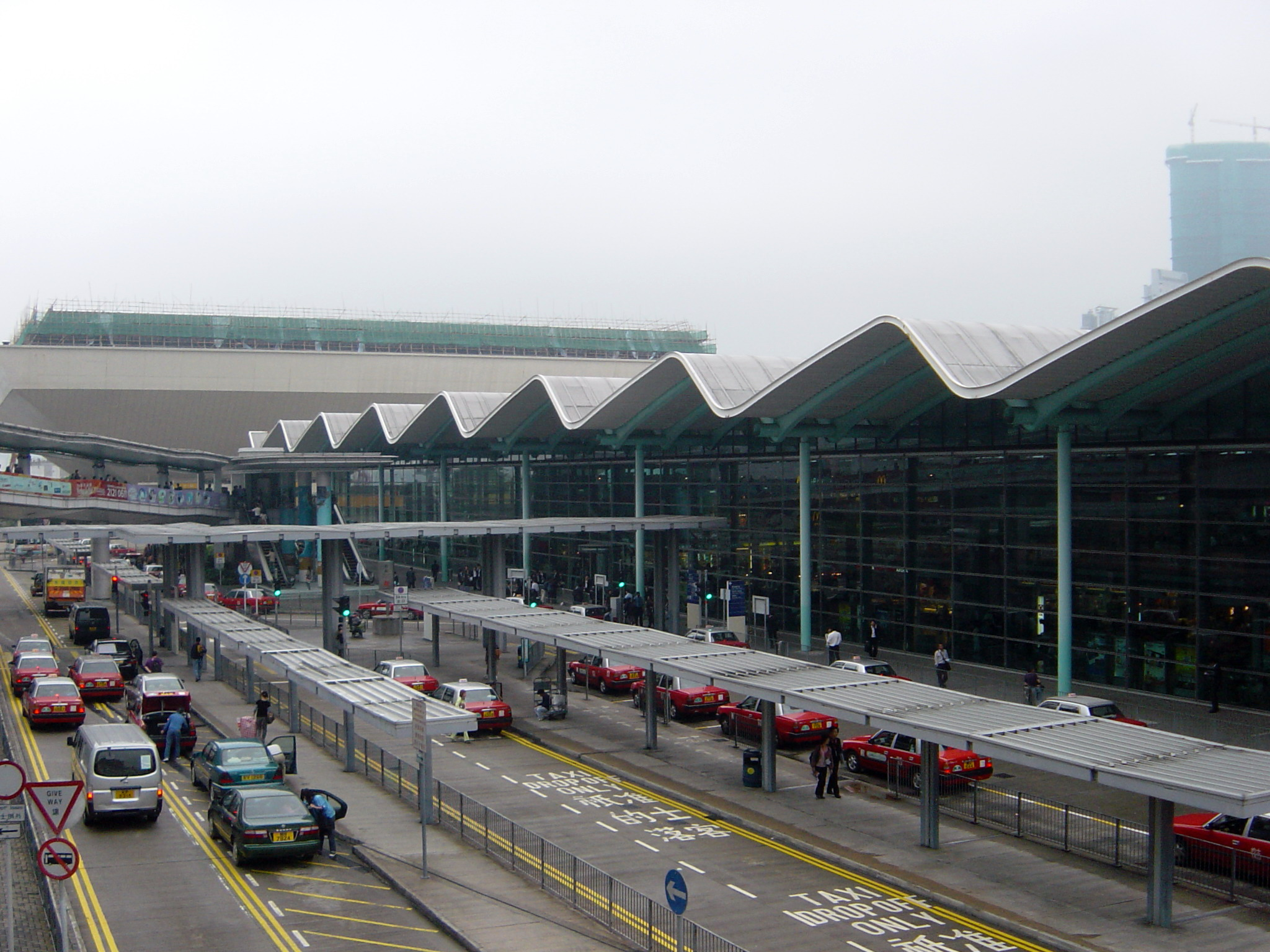 香港體育館。Hong Kong Coliseum, Hung Hom, Hong Kong.